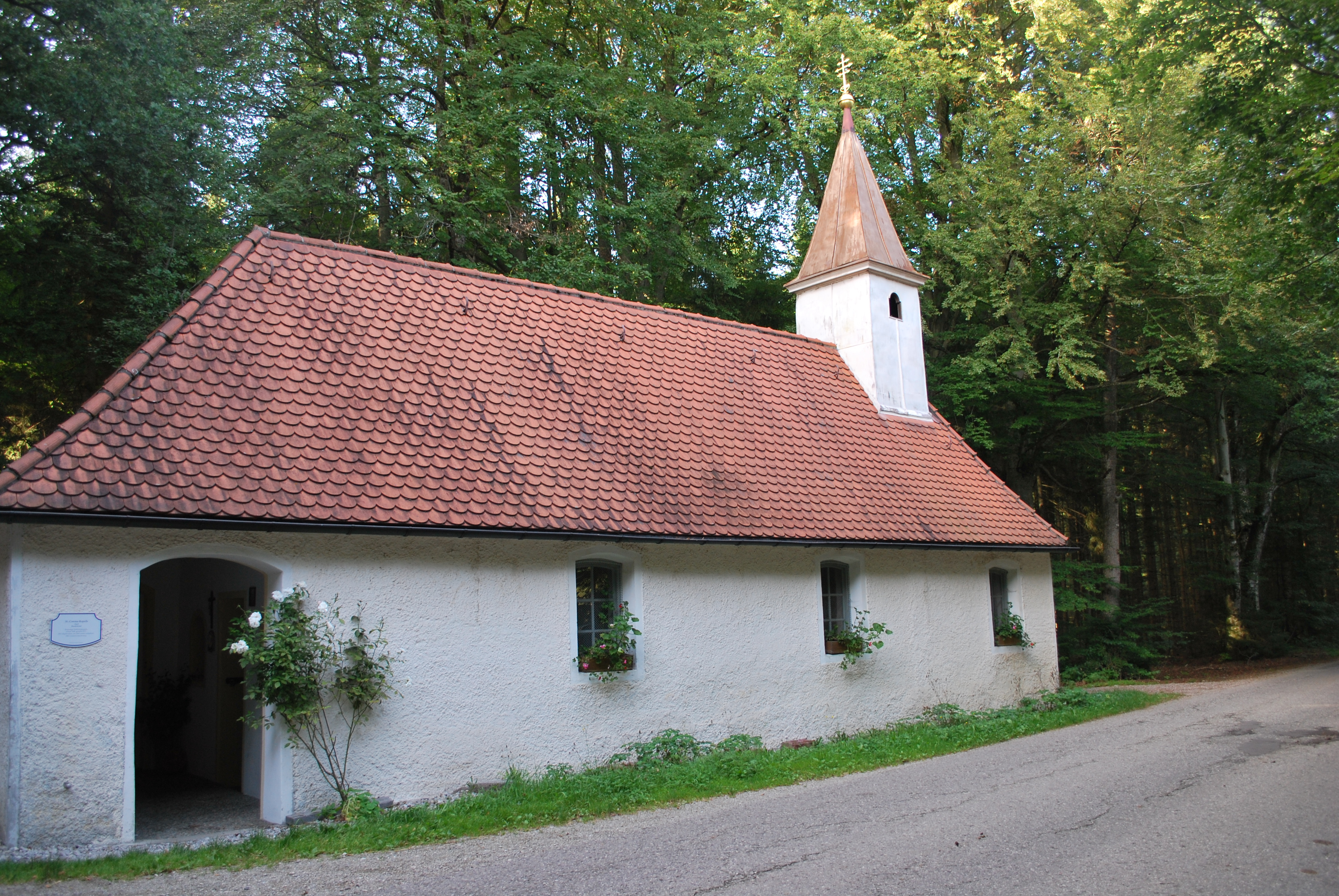 Ehemalige Wallfahrtskapelle, erbaut 1648, 1807 abgebrochen, um 1820 wieder aufgebaut, 1986 Gesamtrestaurierung. Baudenkmal.